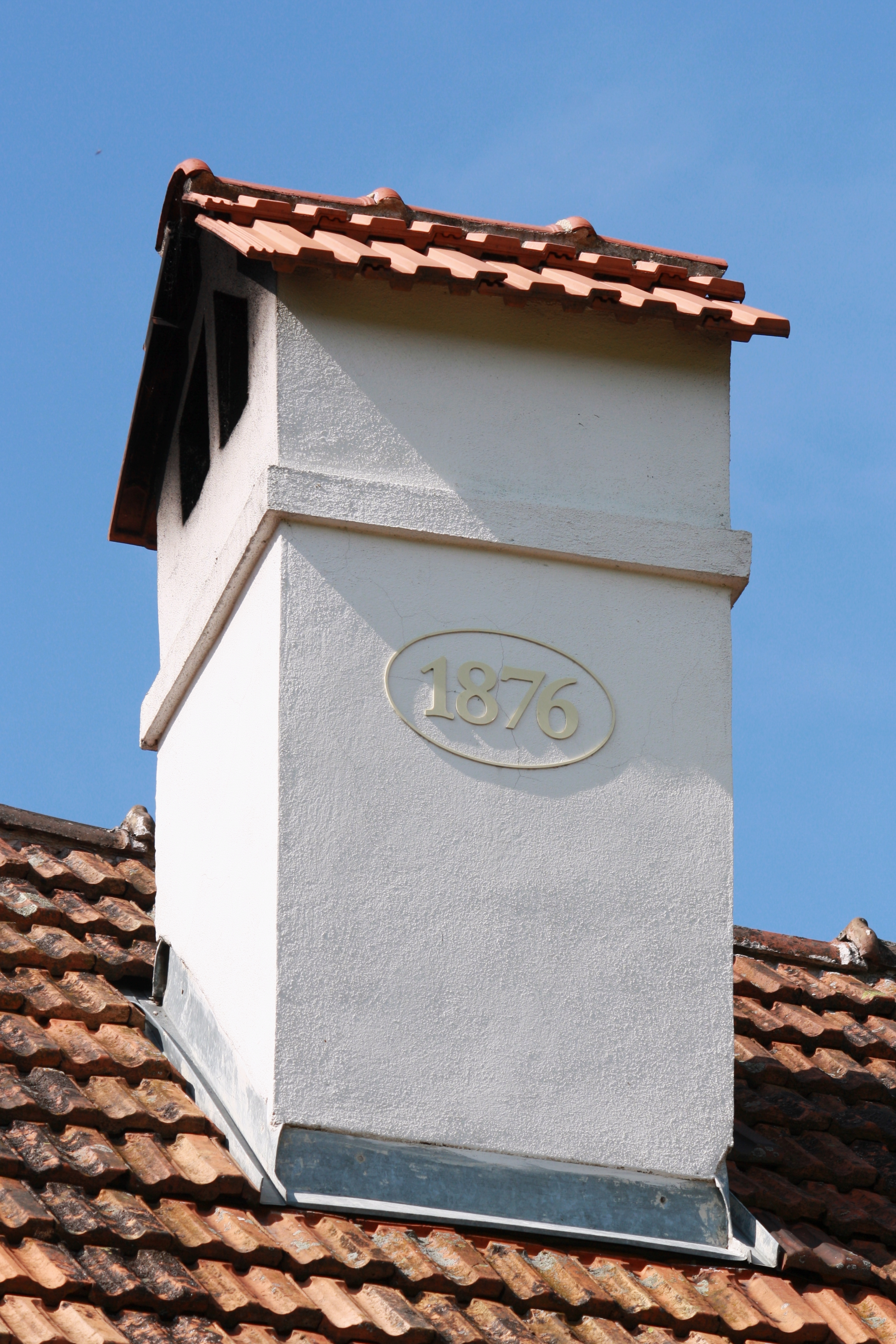 Habří - komín s letopočtem This photograph was taken within the scope of the 'Czech Municipalities Photographs' grant. This photograph was taken with a DSLR from WMCZ's Camera grant.